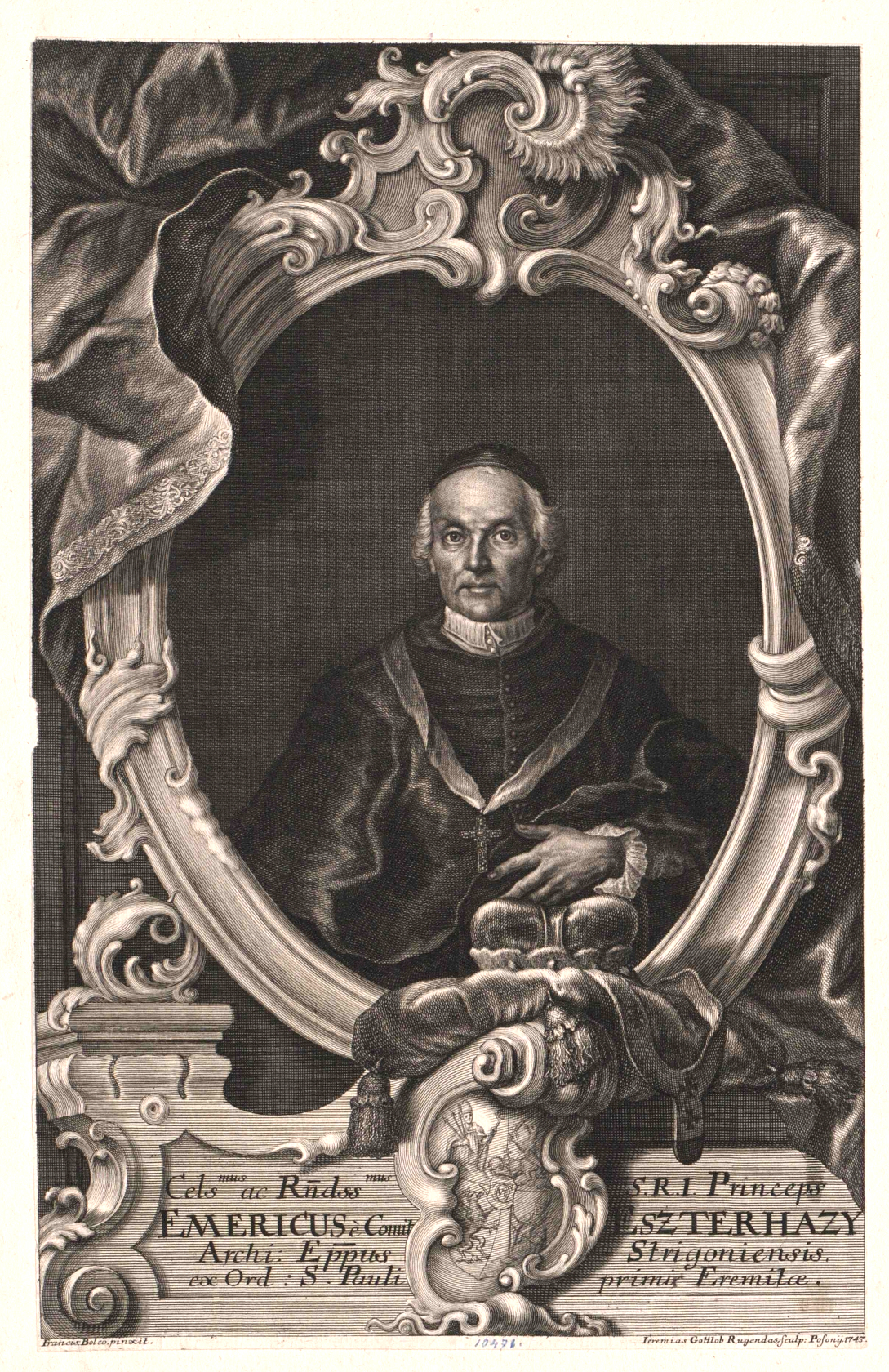 Esterházy Imre esztergomi érsek, főkancellár.